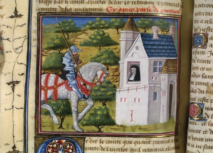 Perceval à la Recluserie Bibliothèque Nationale de France BNF Richelieu Manuscrits Français 111, Fol. 244v Quête du saint Graal, France, Poitiers, XVe siècle